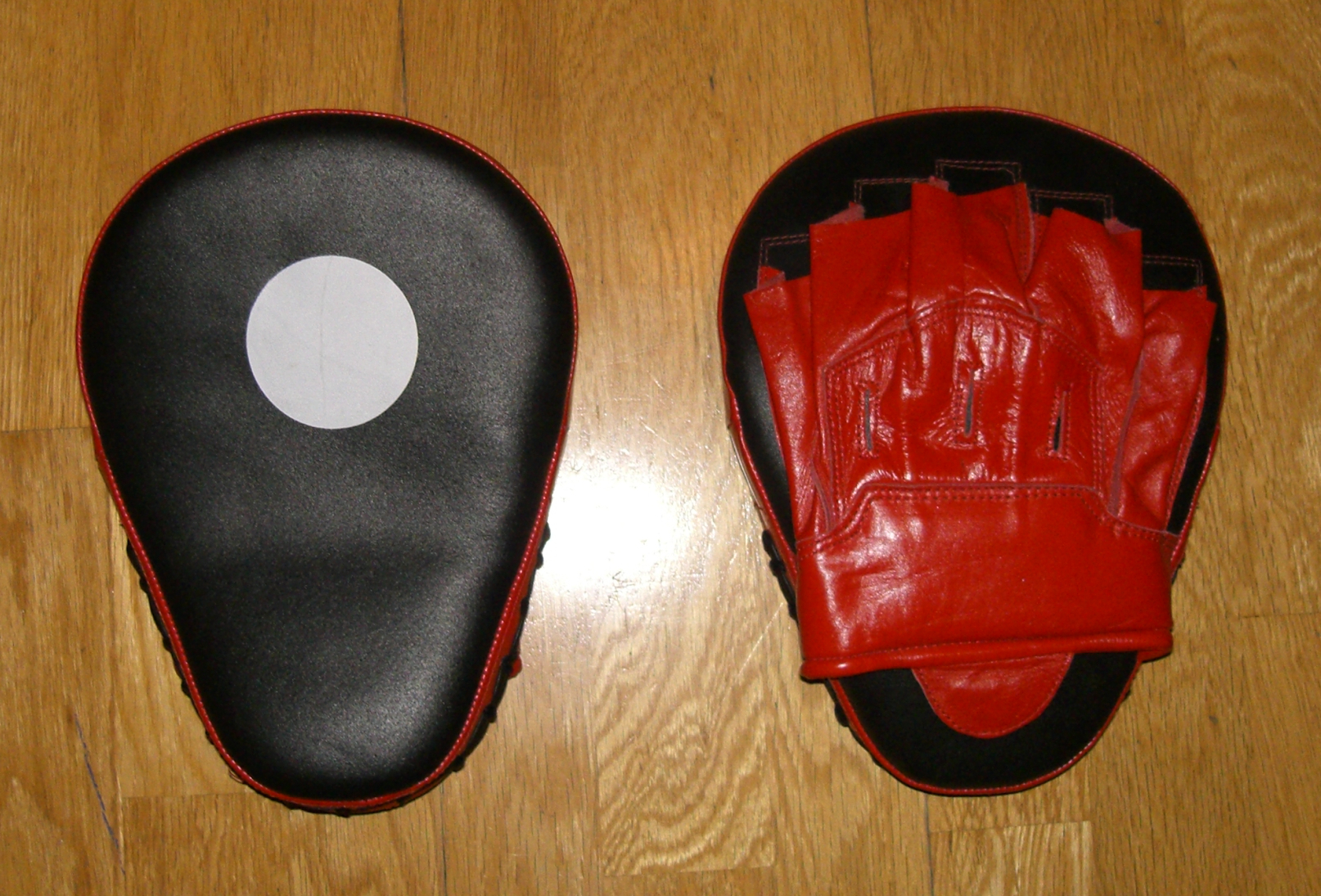 Handpratzen werden beim Boxen vom Trainer u. a. zur Reaktionsschulung eingesetzt.